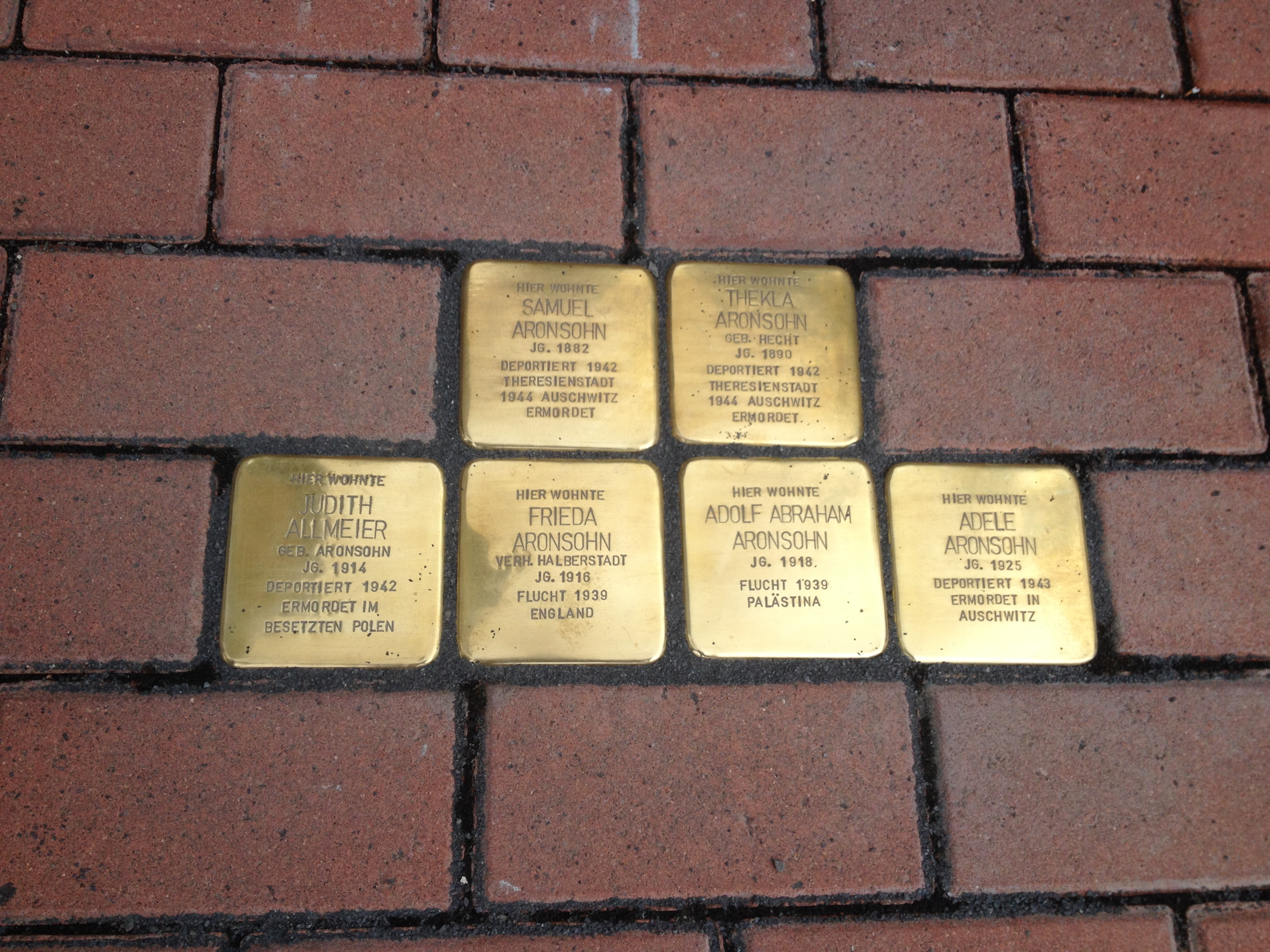 Stolpersteine in Oberzell (Sinntal) in der Sinntalstraße 34